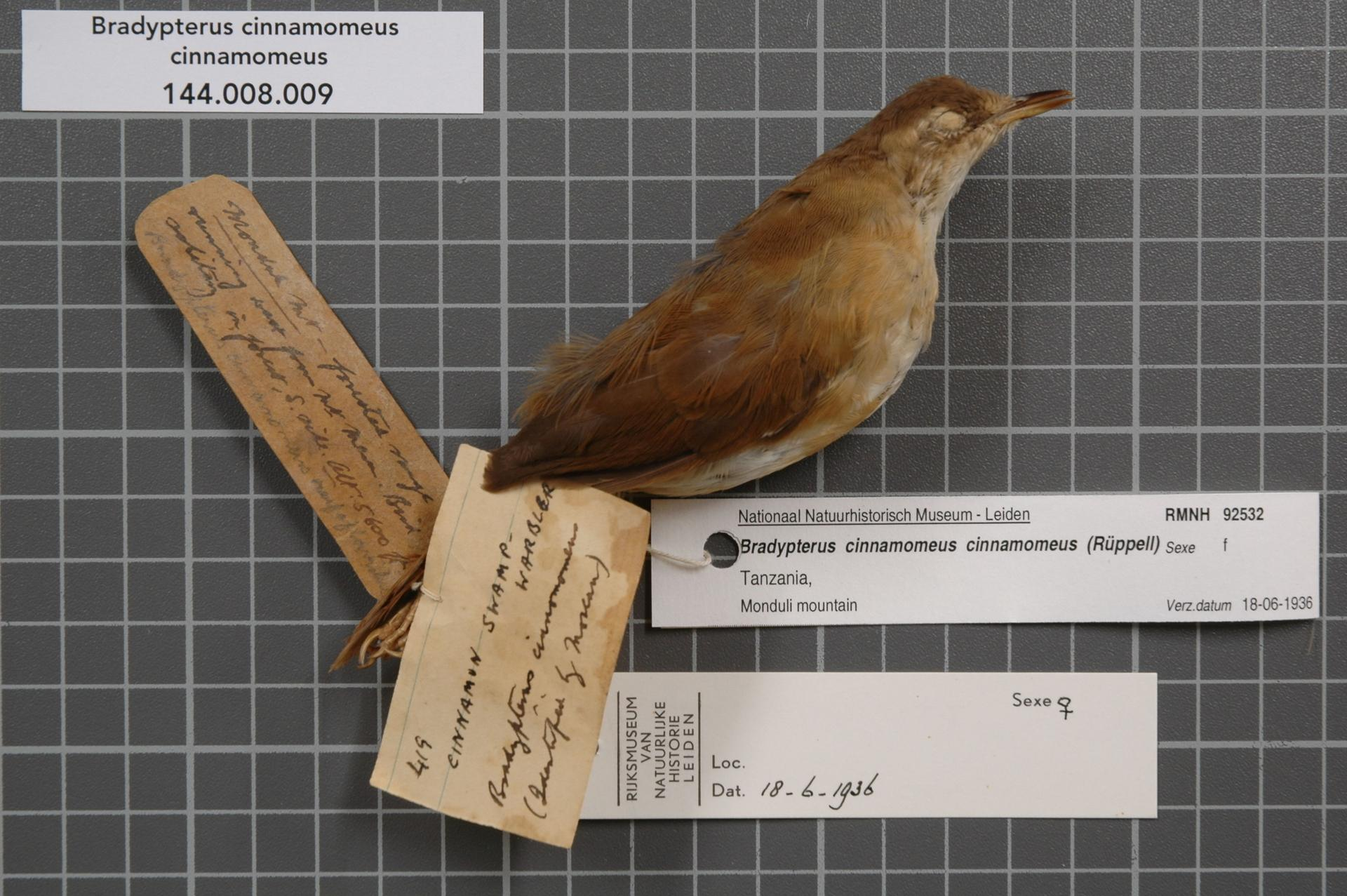 Bradypterus cinnamomeus cinnamomeus (Ruppell, 1840)